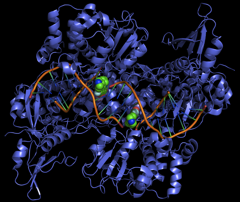 Structure de l'ADN gyrase complexée à l'ADN et à deux molécules de ciprofloxacine (vert) Unknown